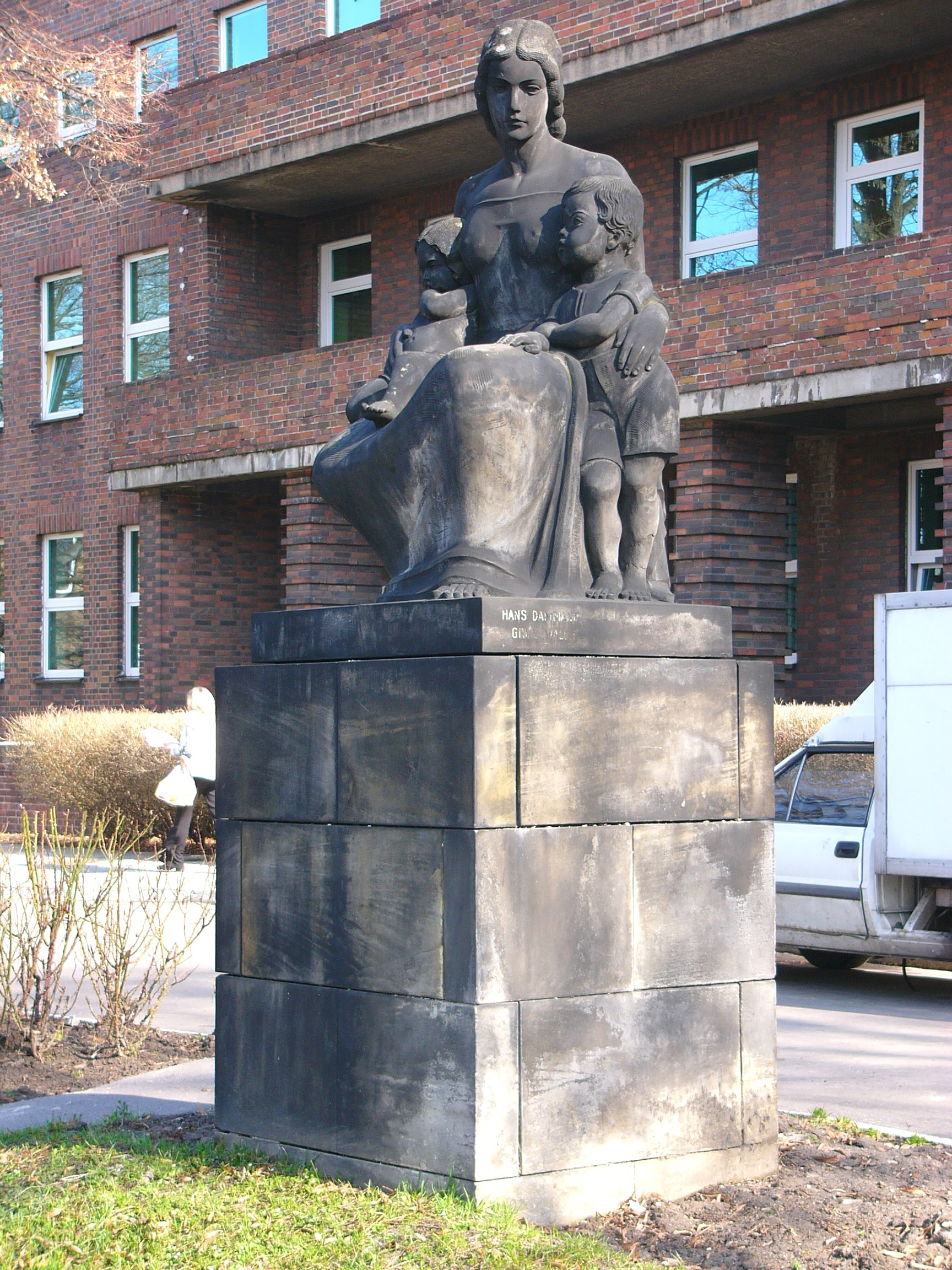 Przed budynkiem dawnej Krajowej Kliniki dla Kobiet w Gliwicach. Pomnik Matki autorstwa Hansa Dammanna.